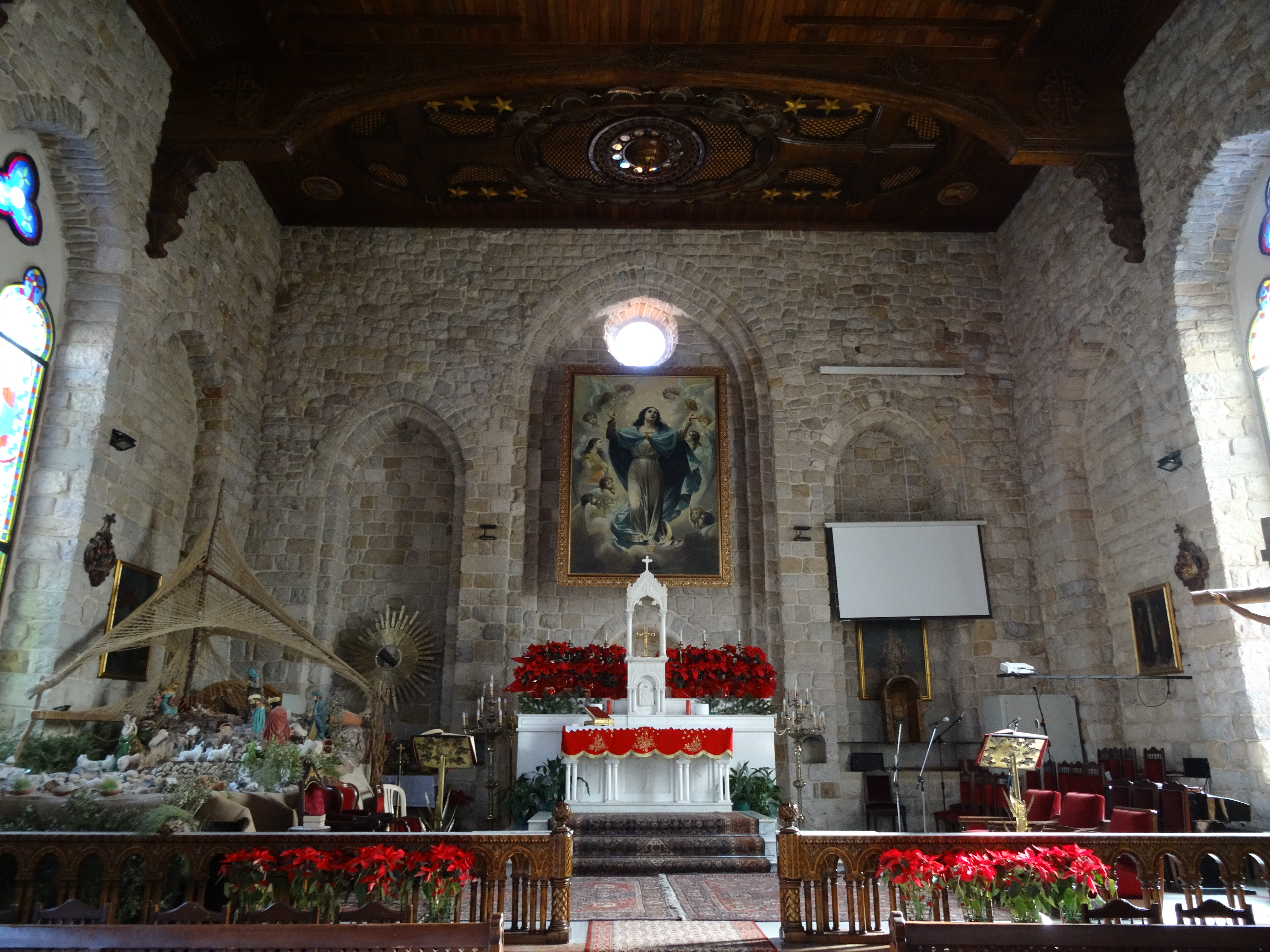 Église maronite Notre-Dame-de-l'Assomption à Daroun (Kesrouan) au Liban